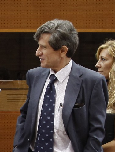 Primera sesión del debate de investidura de Esperanza Aguirre